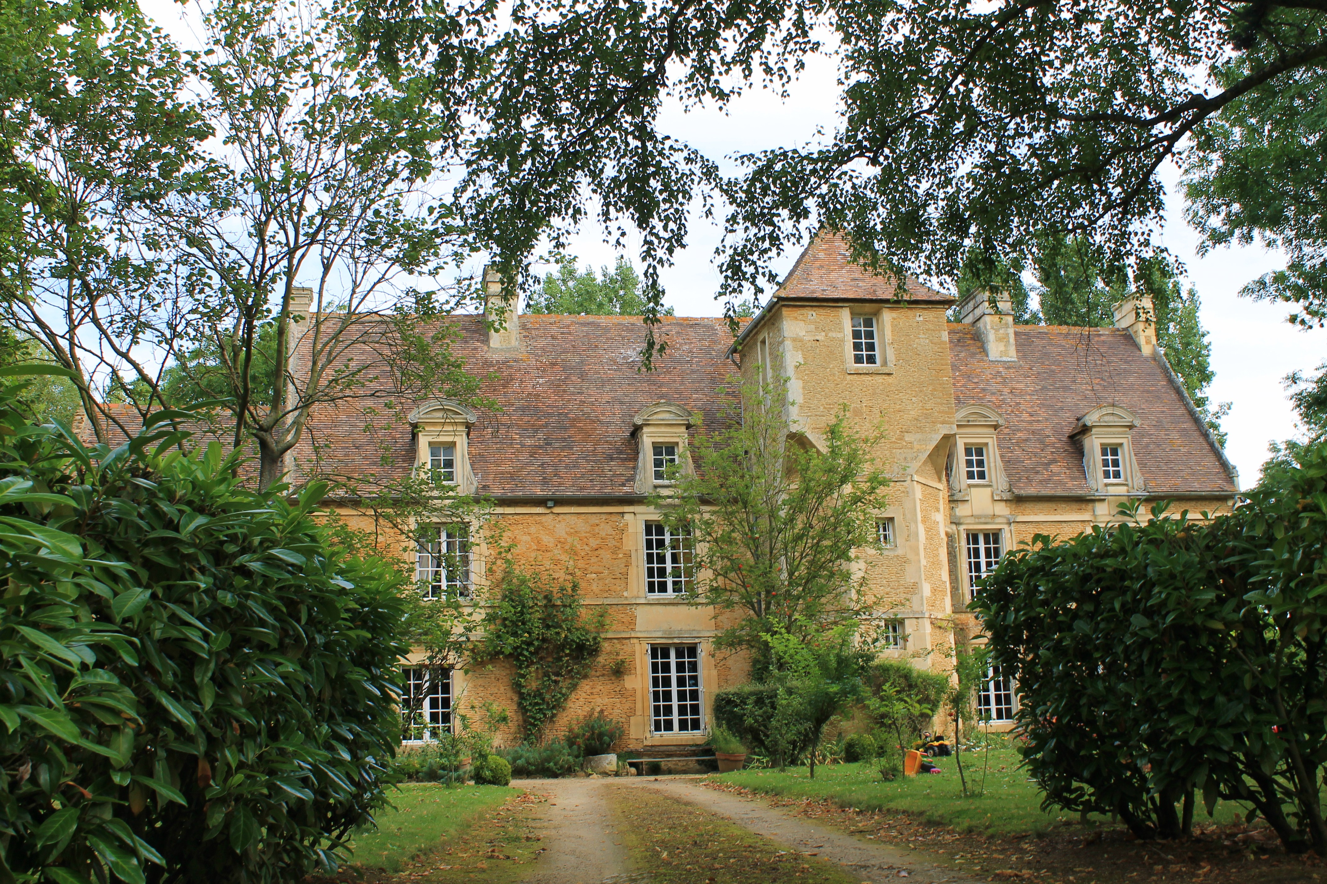 Manoir d'Émiéville (Calvados)